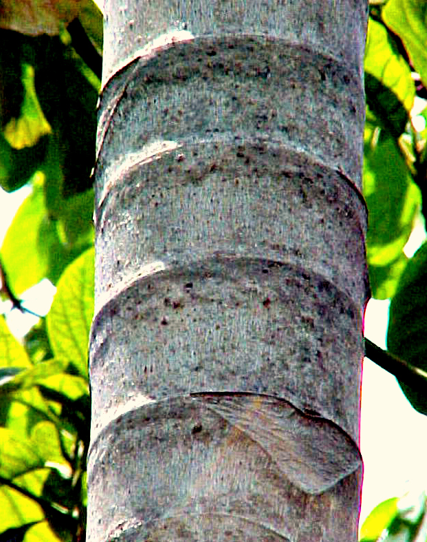 Corteza de Arbol